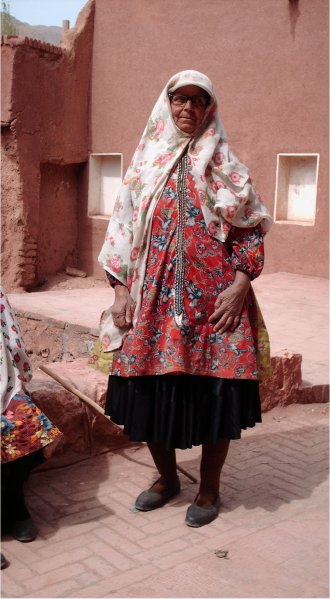 Traditional dressing of an inhabitant/Costume traditionnel d'une habitante